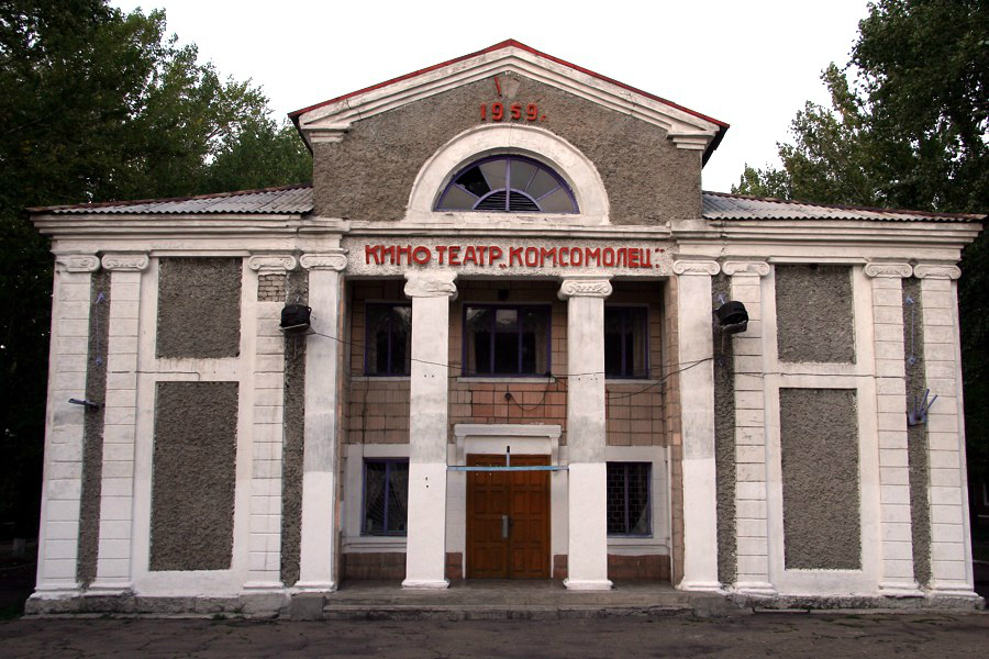 Кинотеатр "Комсомолец", посёлок Кленовый, Луганская область, Украина